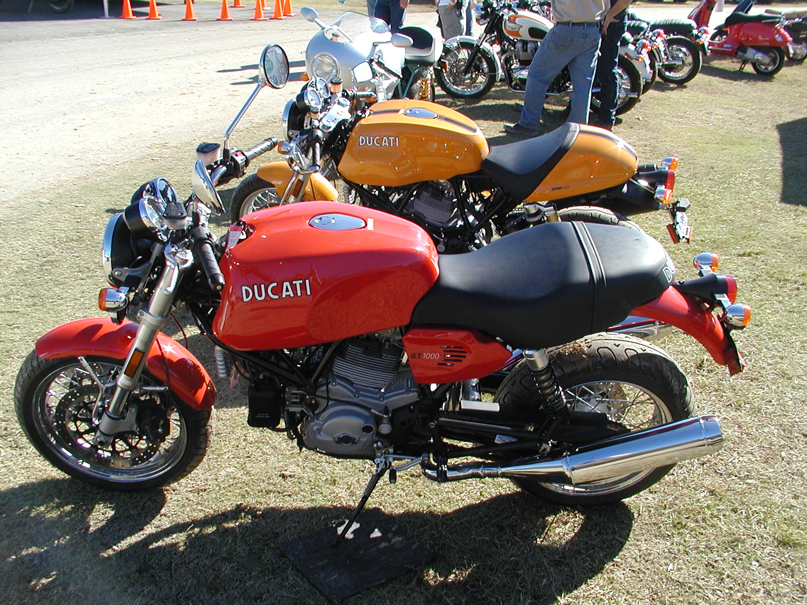 Ducati 1000 GT